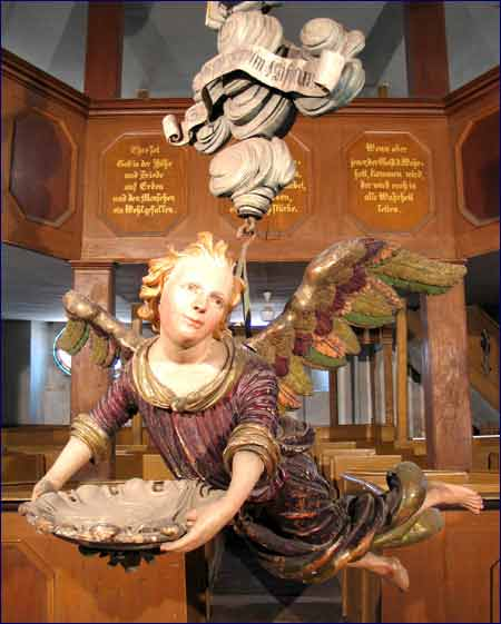 Taufengel